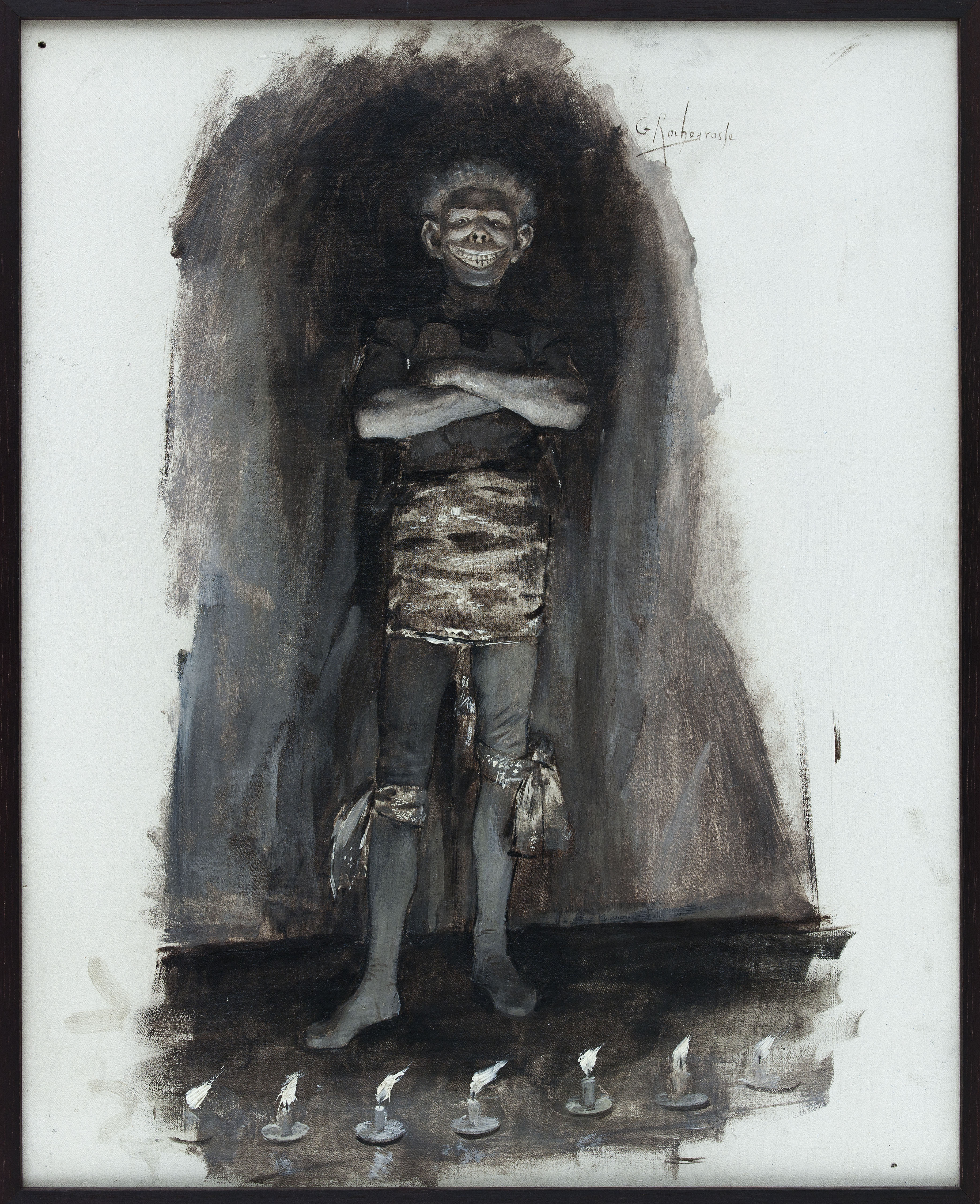 Portrait de Gwynplaine sur la scène de la Green-box. Cette peinture à l'huile de Georges-Antoine Rochegrosse a servi de modèle à la gravure de Fortuné Méaulle reproduite en page 1 du roman de Victor Hugo, L'Homme qui rit, dans l'Édition Hugues (1886). L'illustration correspond au texte de la deuxième partie « Par ordre du roi », livre II « Gwynplaine et Dea », chapitre I « Où l'on voit le visage de celui dont on n'a encore vu que les actions ».